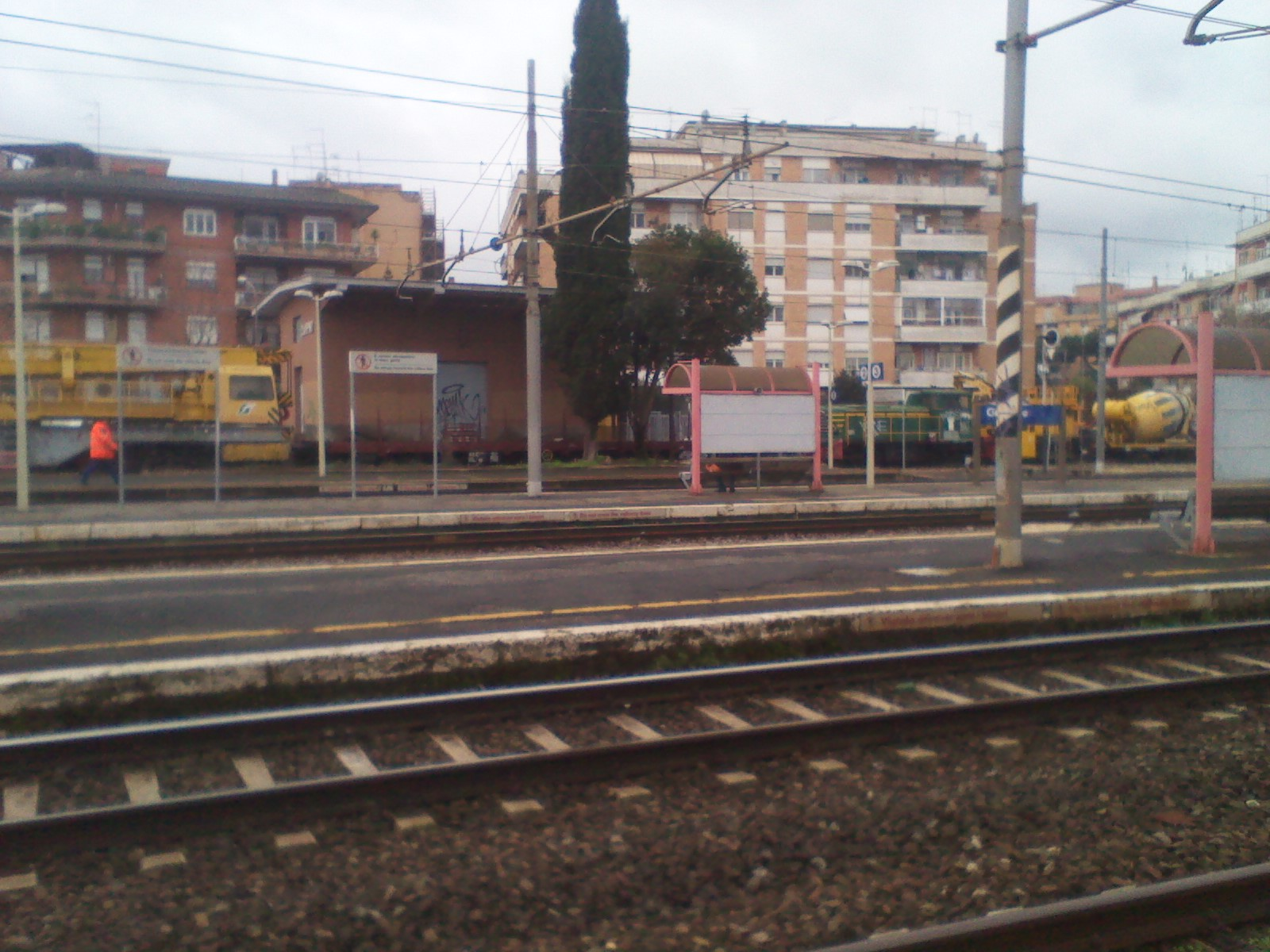 Vista delle prime tre banchine (in primo piano) ed al centro il fabbricato merci con un convoglio merci sul suo binario di scalo.